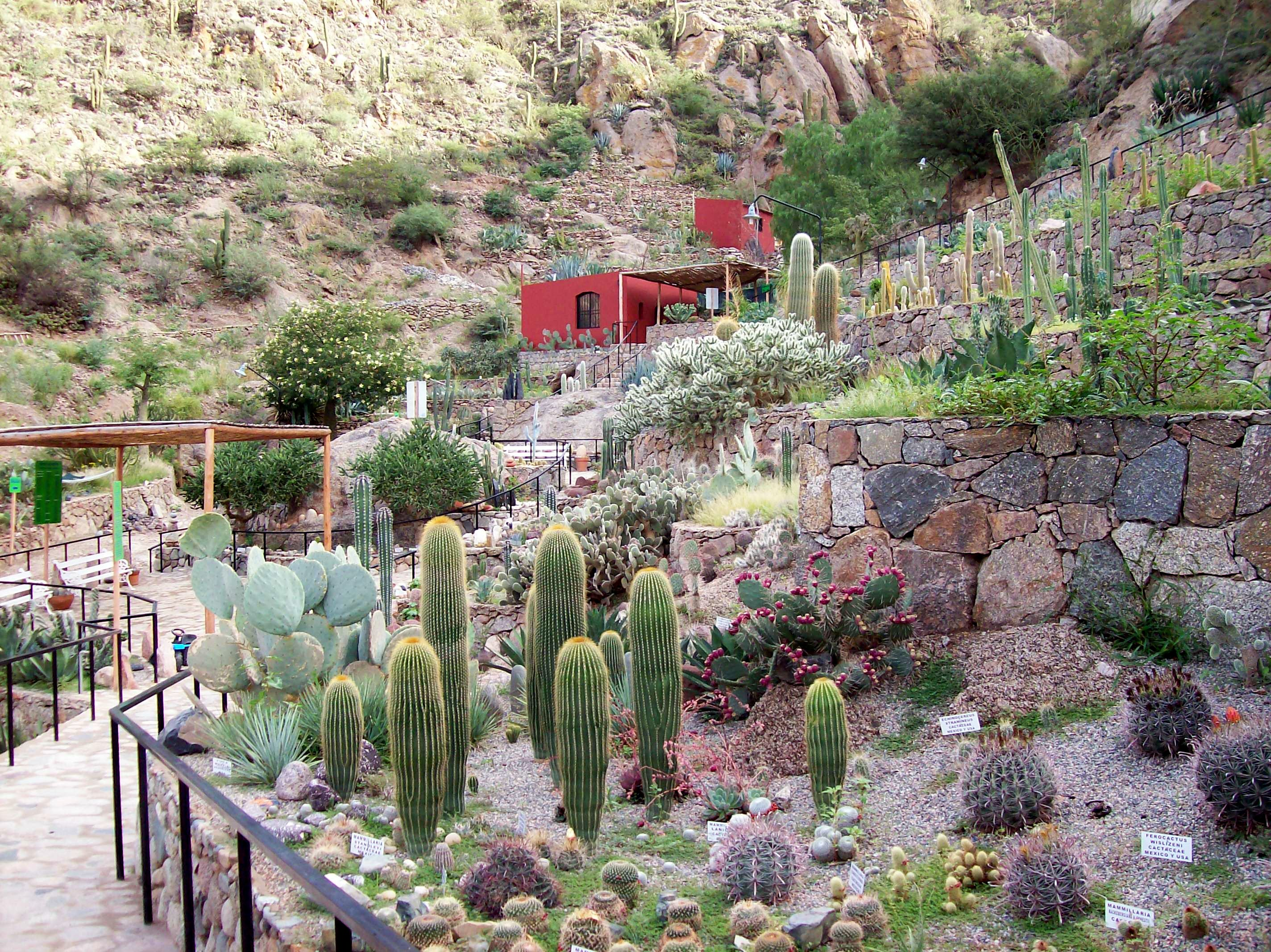 Jardín botánico de cactus y museo arqueológico Chirau Mita en Chilecito, en la provincia argentina de La Rioja. Situado en Primera Junta (ex Ruta 12) a 200 m al oeste del encuentro de dicha calle con dicha ruta. (sobre la ladera sur del Paimán, junto al polideportivo que está al oeste). La foto está tomada mirando aproximadamente al NO).